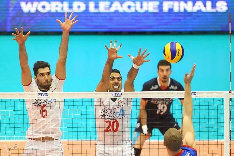 لیگ جهانی والیبال-دیدار ایران و صربستان